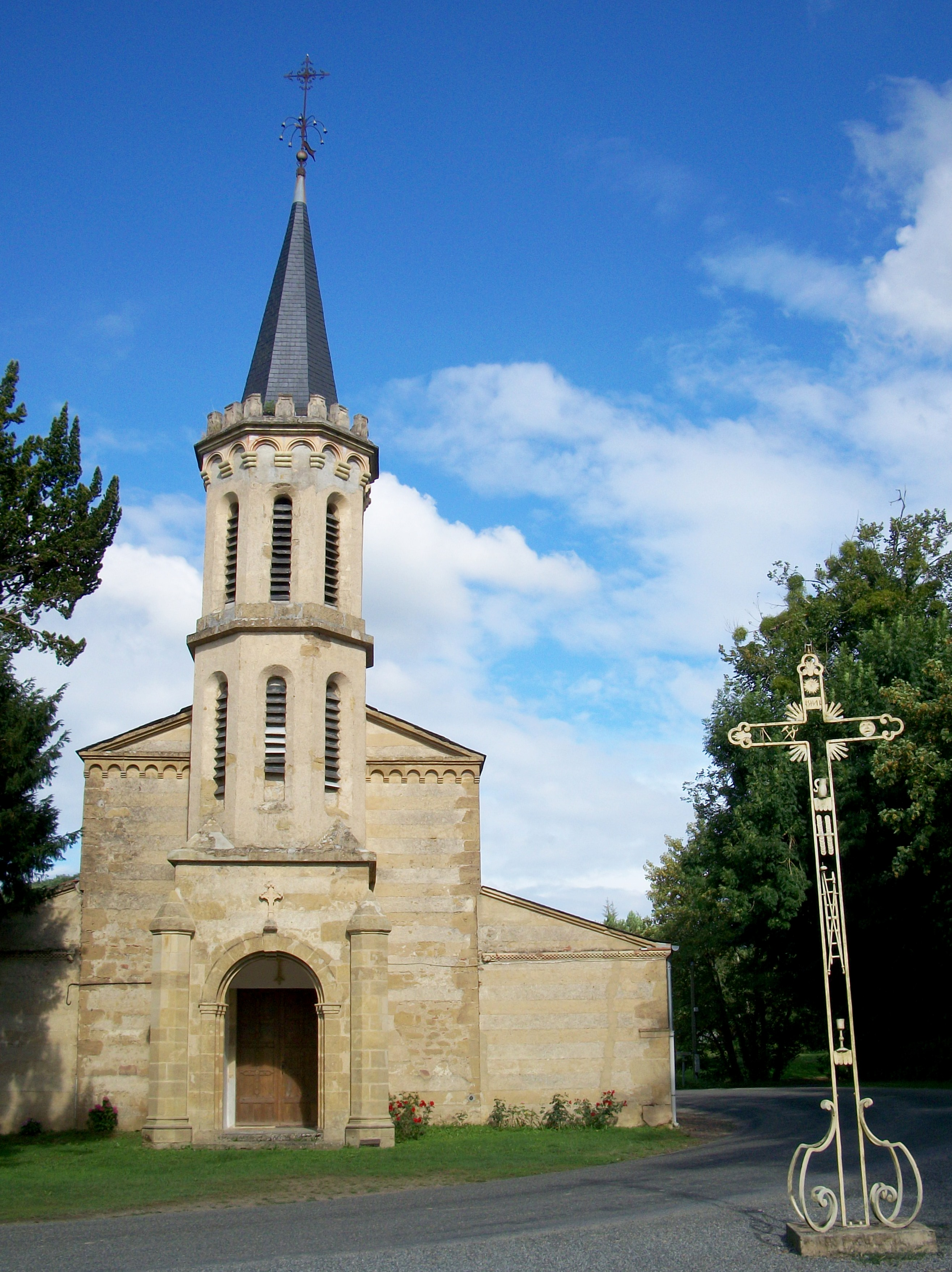 Église de Ponsan-Soubiran (Gers, France)